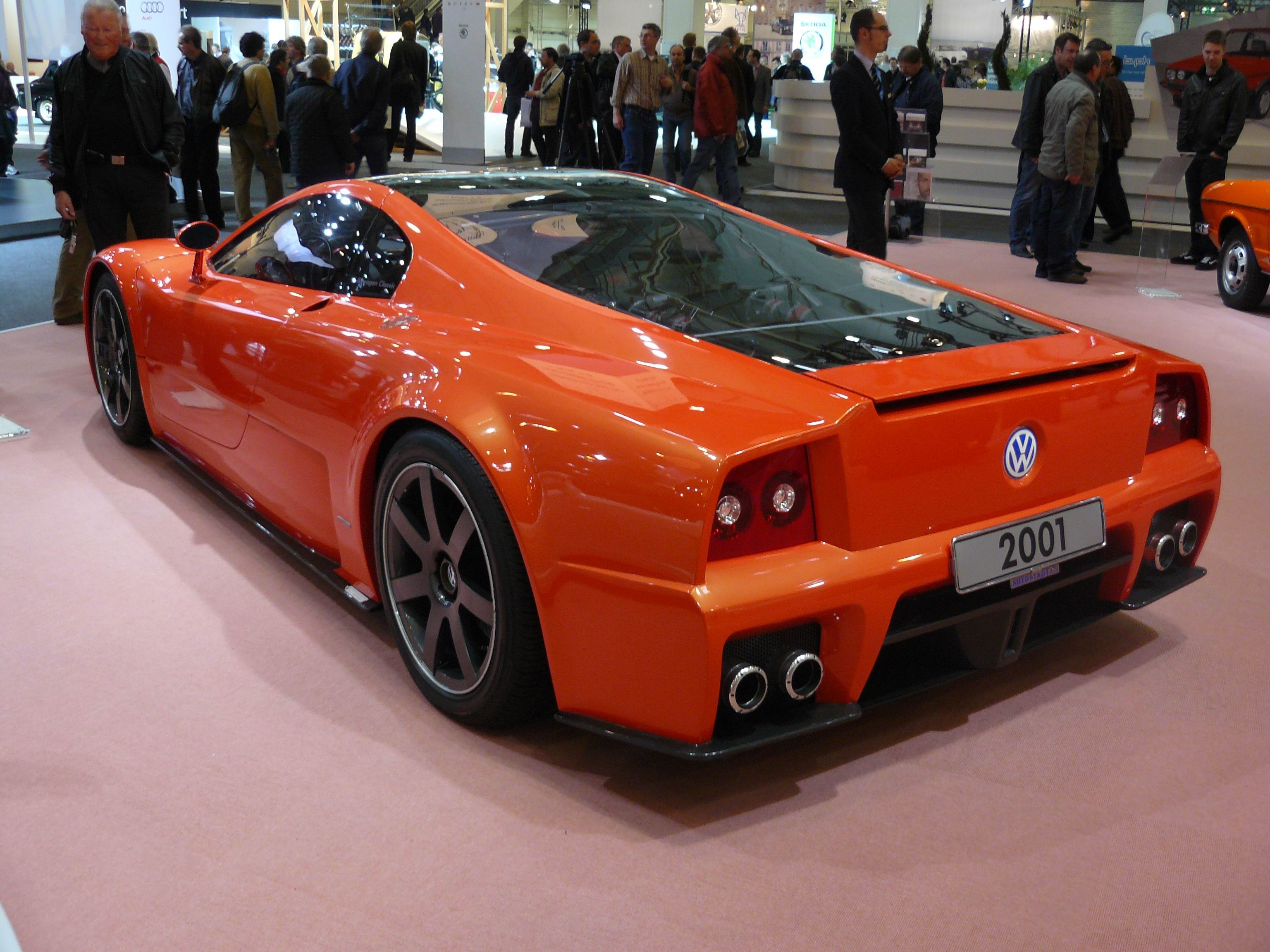 Essen 2011